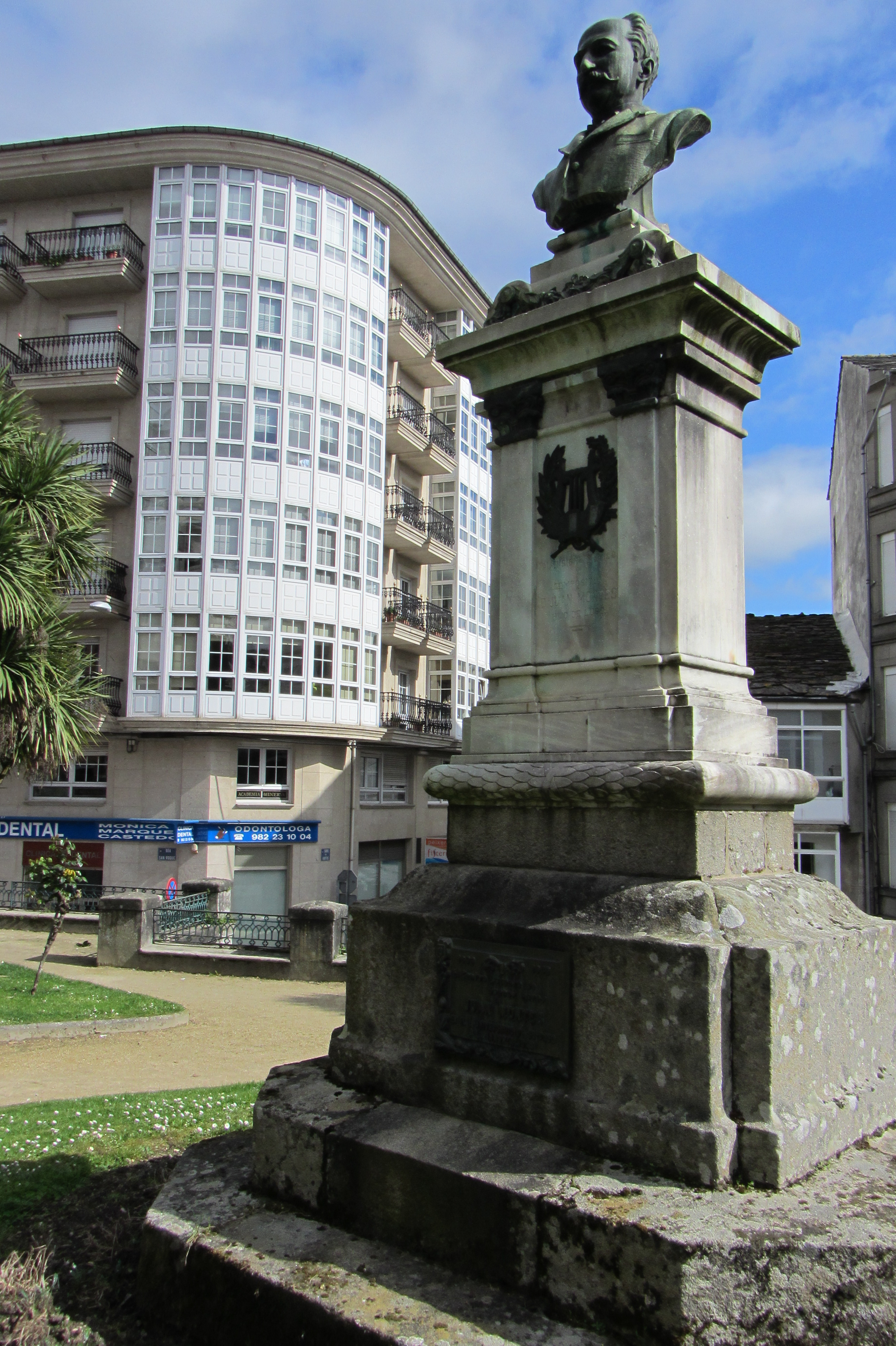 Monumento a Juan Montes situado en el Jardín de San Roque en la ciudad de Lugo (Galicia, España). La obra es del escultor Eugenio DuqueGalego: Monumento a Xoán Montes situado no Xardín de San Roque na cidade de Lugo (Galicia, España). A obra e do escultor Eugenio Duque.